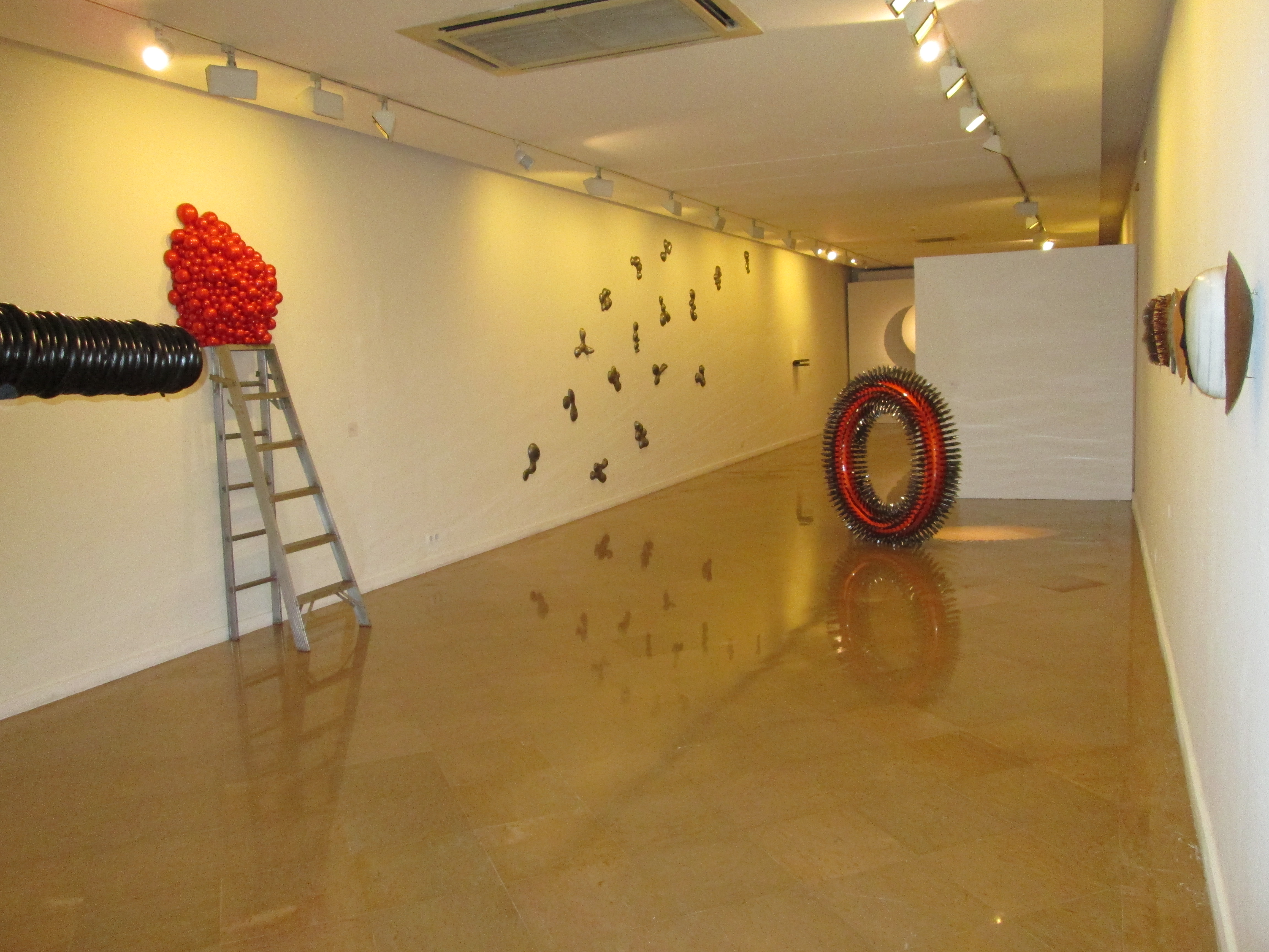 Exposición "Manual de resistencia y acción. La escultura de Antoni Marquès" (del 6 de febrero al 27 de abril de 2014). Museo de Arte de Sabadell, calle del doctor Puig, 16, Sabadell, Barcelona (España).